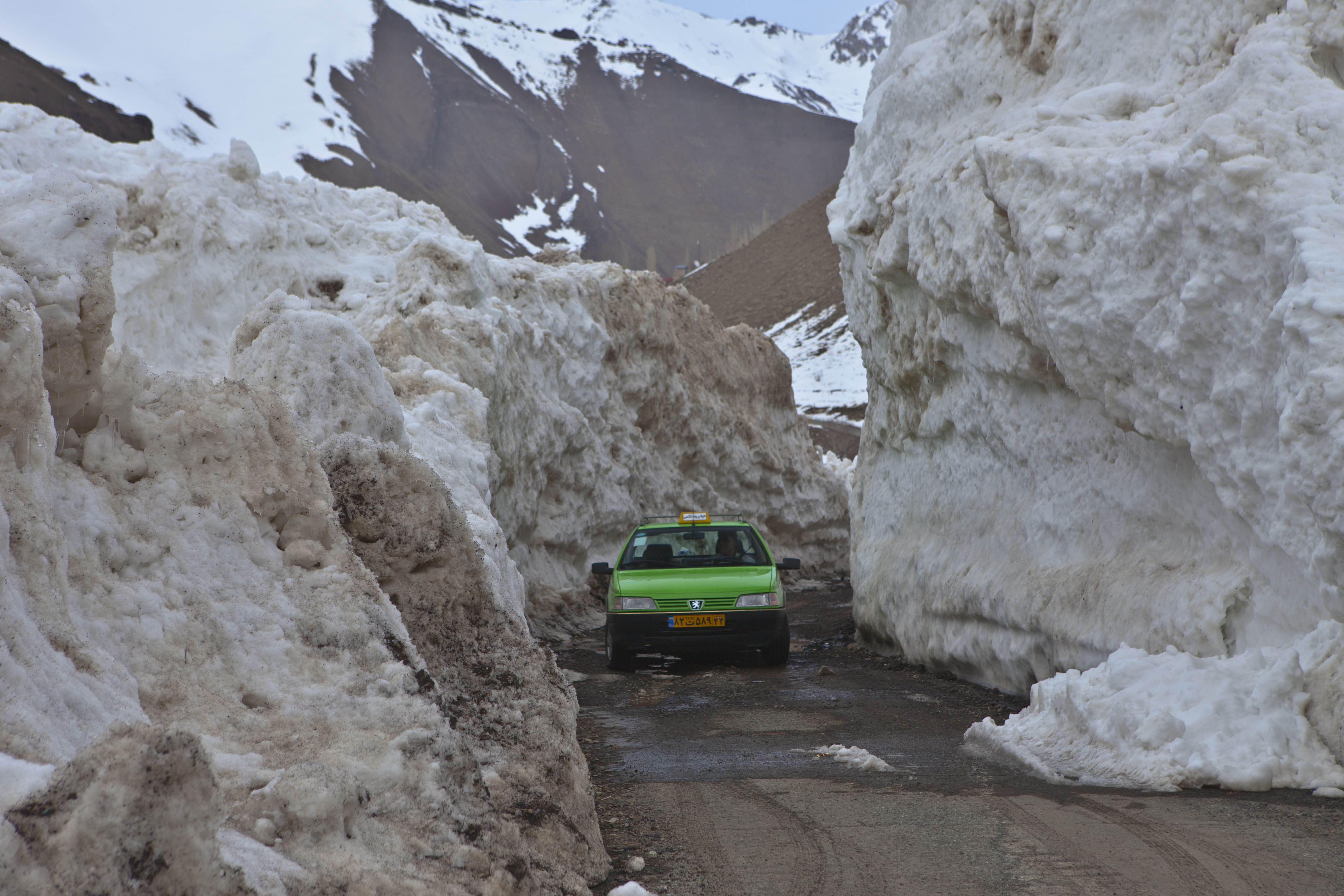 ریزش بهمن در روستای وارنگه‌رود، بخش آسارا، شهرستان کرج، استان البرز.